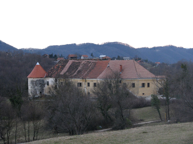 Dvorac Mali Tabor